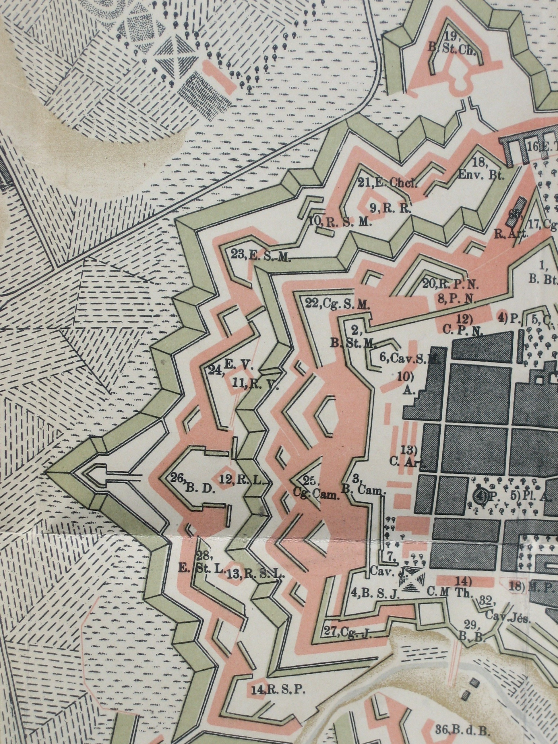 D'Neipuert-Front vun der Festung Lëtzebuerg, 1794; Ausschnëtt aus der Kaart vum A, Lefort. Legend vun uewen no ënnen a vu bannen no baussen): 1, B. Bt. = Bastion Berlaymont 2, B. St. M. = Bastion Ste. Marie 3, B.Cam. = Bastion Camus 4, B. S.J. = Bastion St. Jost 17, Cg. Bt. = Contregarde Berlaymont 20, R.P.N. = Ravellin Porte-Neuve 22, Cg. S.M. = Contregarde Ste. Marie 11, R.V. = Redoute Vauban 25,Cg. Cam. = Contregarde Camus 27, Cg. J. = Contregarde St. Jost 18, Env .Bt. = Enveloppe Berlaymont 21, E.Chcl. = Enveloppe Chanclos 9, R. R. = Redoute Royale 10, R.S.M = Redoute Ste Marie 23, E.S.M = Enveloppe Ste Marie 24, E. V. = Enveloppe Vauban 26, B.D. = Bastion détaché Daun 12, R.L. = Redoute Louvigny 28, E. St.L. = Enveloppe St Lambert 13, R. S. L. = Redoute St Lambert 14, R.S.P. = Redoute St Pierre 19, B St. Ch. = Bastion détaché St Charles 15, R. Rh.= Redoute Rheinsheim